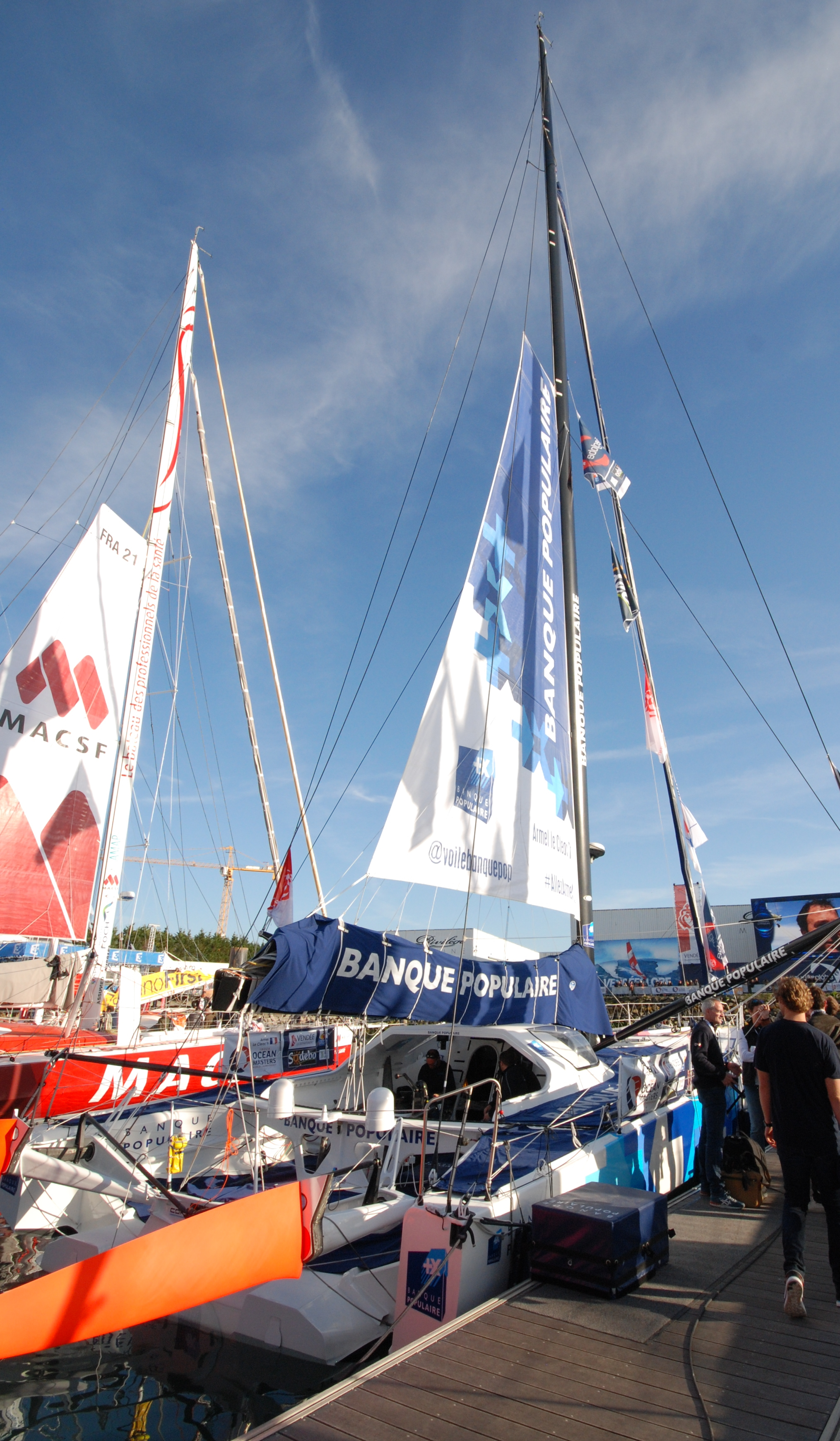 Banque populaire VIII